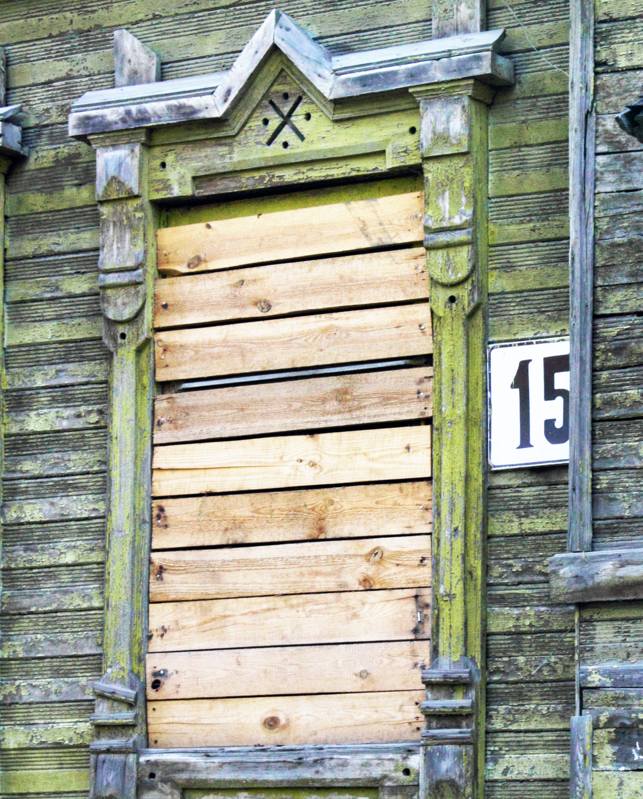 Жилой дом И.Ф. Эглит: улица Короленко, 15, Нижний Новгород, Нижегородская область